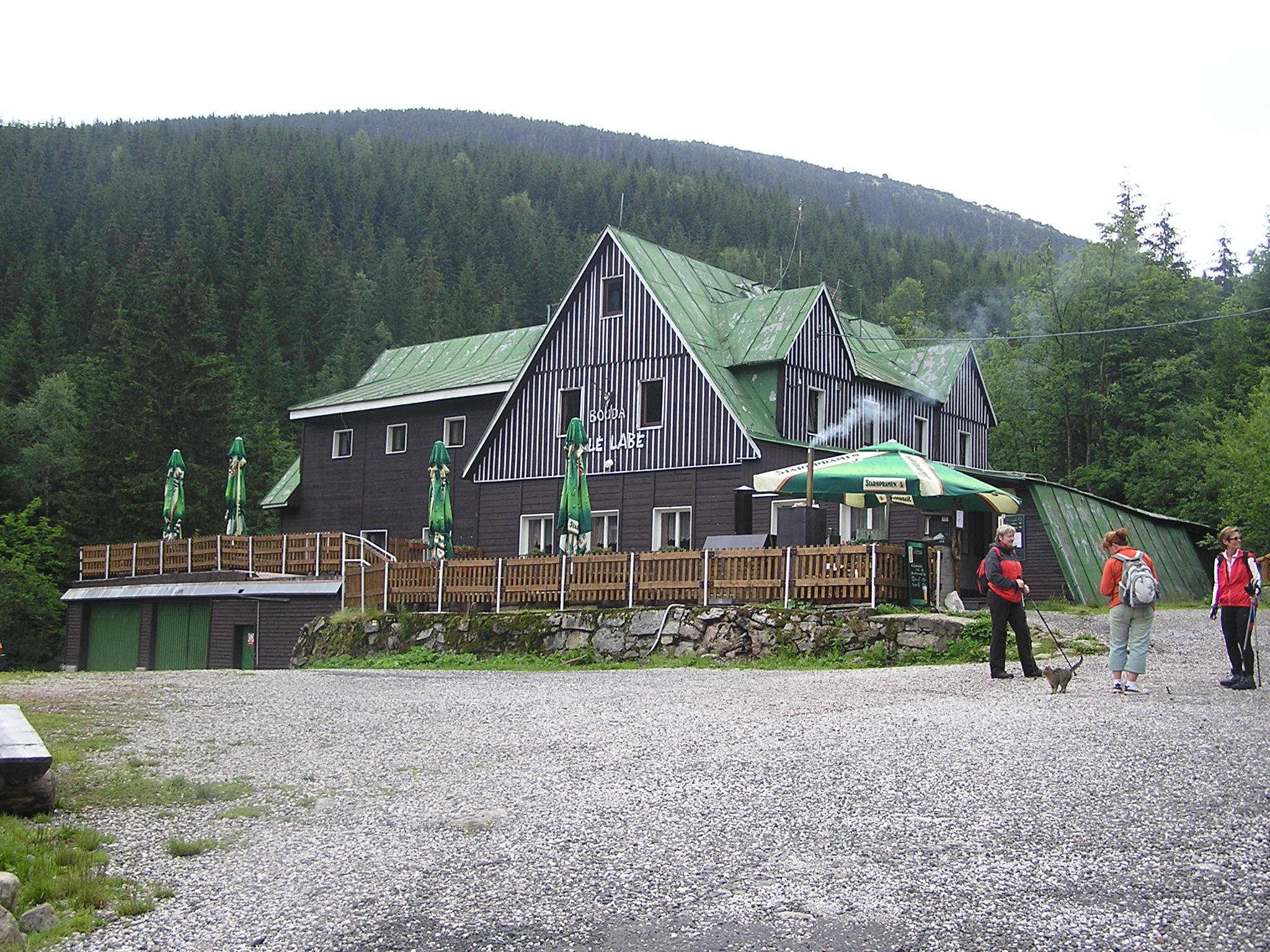 Bouda u Bílého Labe z Weberovy cesty